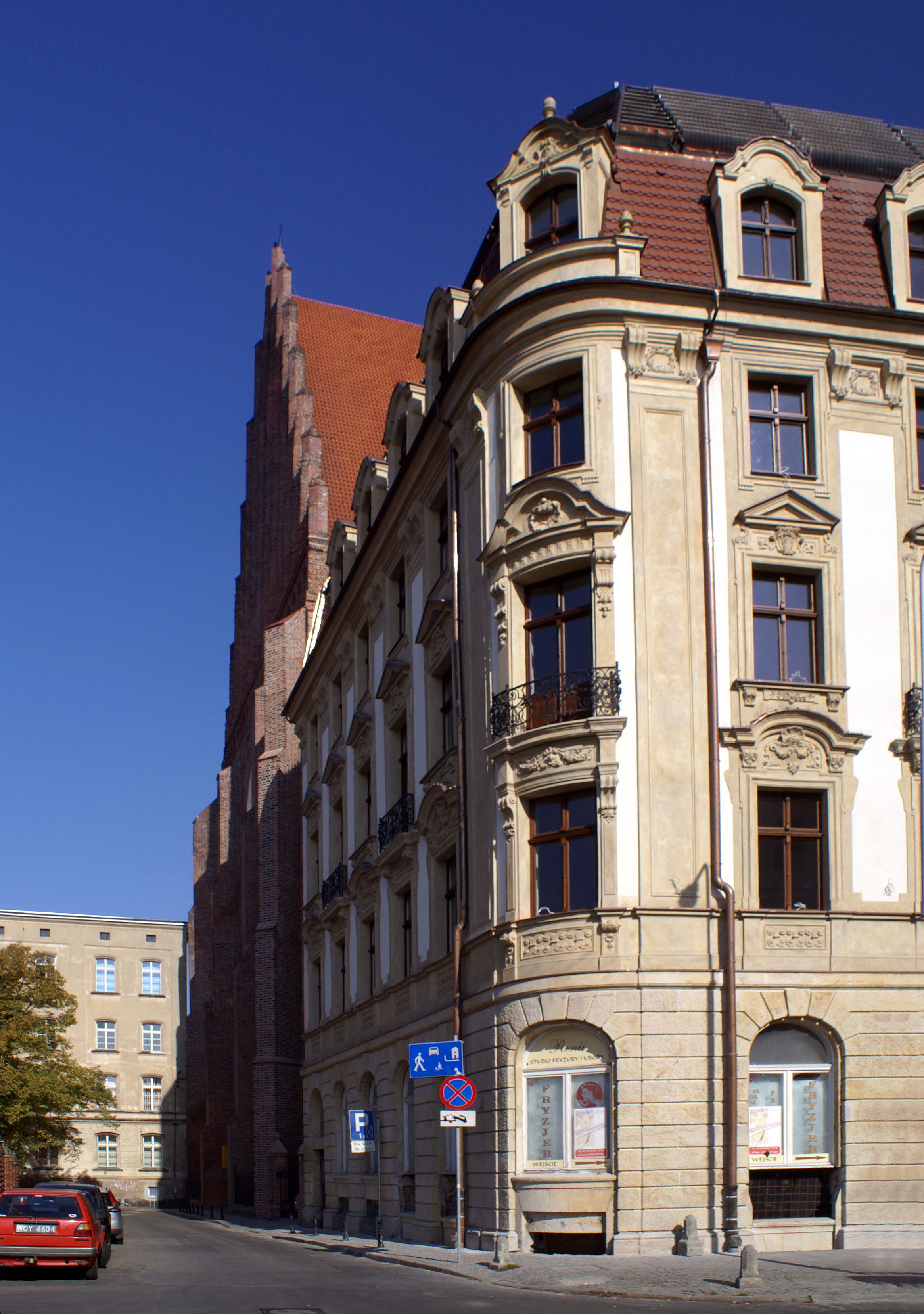 Hotel Monopol (wraz z działką 25/1) Modrzejewskiej 2 (Świdnicka 33), Miasto Wrocław - Stare Miasto